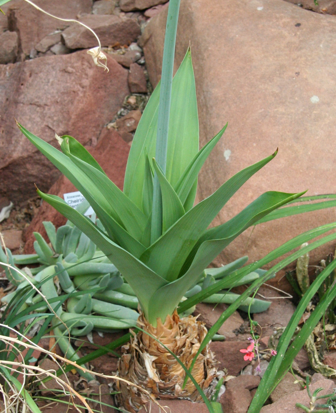 Scilla natalensis im Botanischen Garten Köln